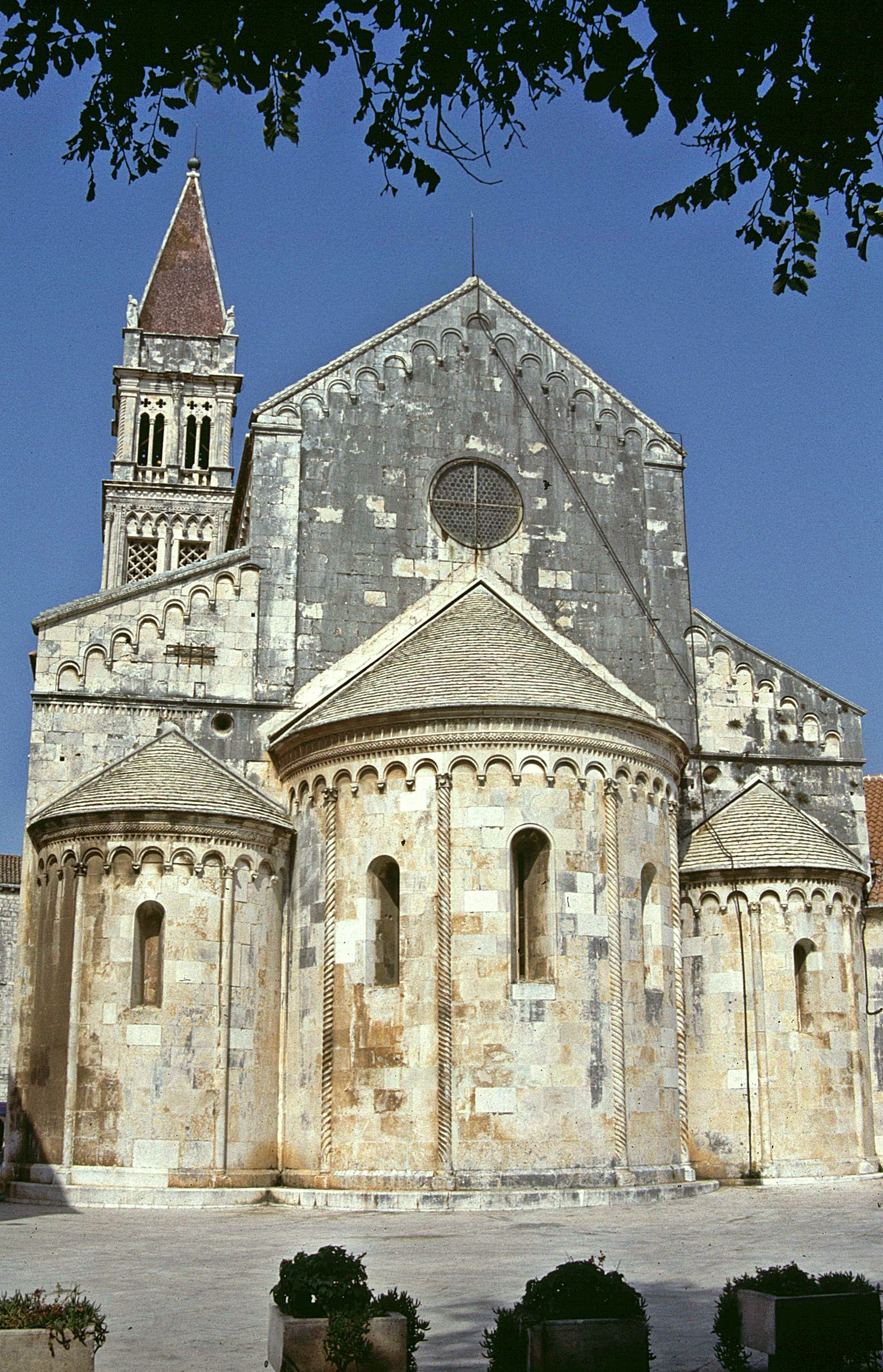 Trogir: Sveti Lovre: Apsiden